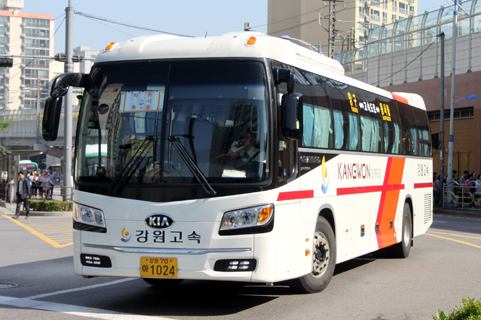 기아 뉴 그랜버드 정 측면